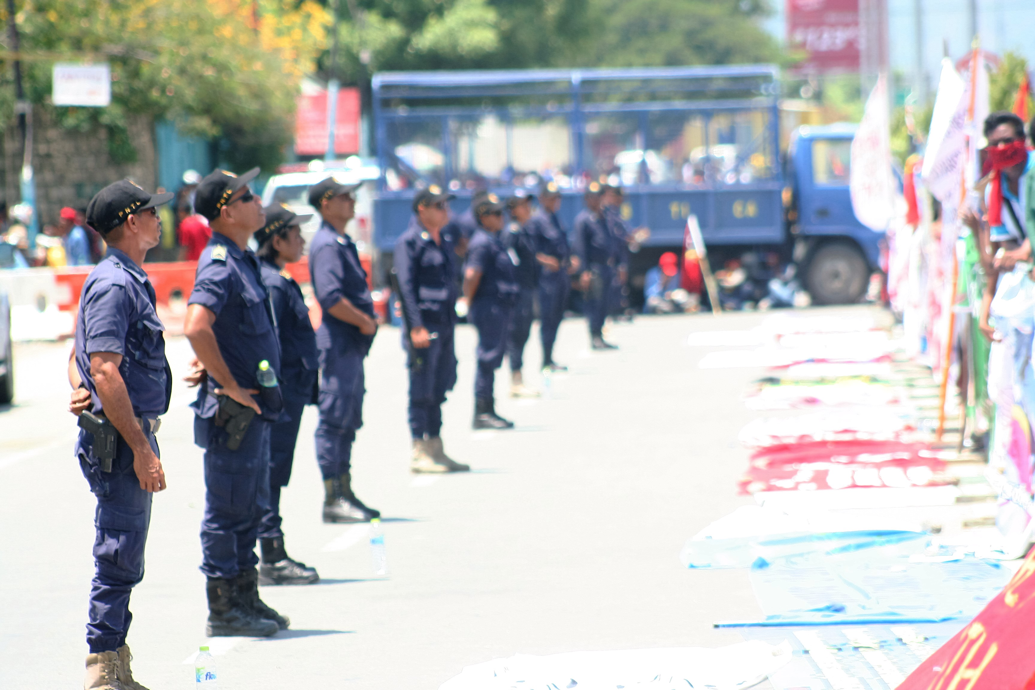 Tetun: Demostrasun Loron 2 iha Embasada Australia nian oin, Polisia Nasional Timor-Leste halo seguransa.